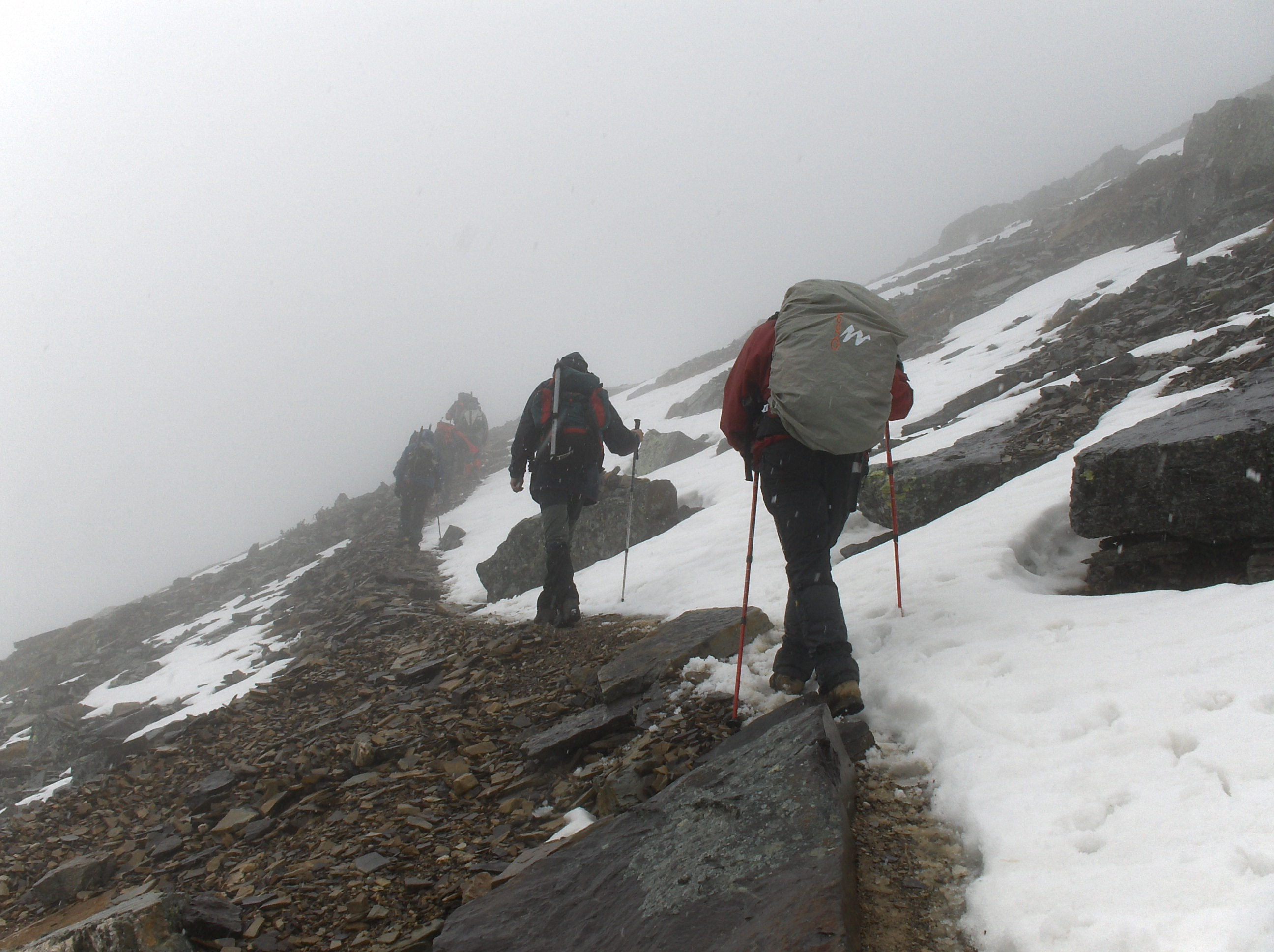 Ascenso al Moncayo. Aragón, España. 2007.